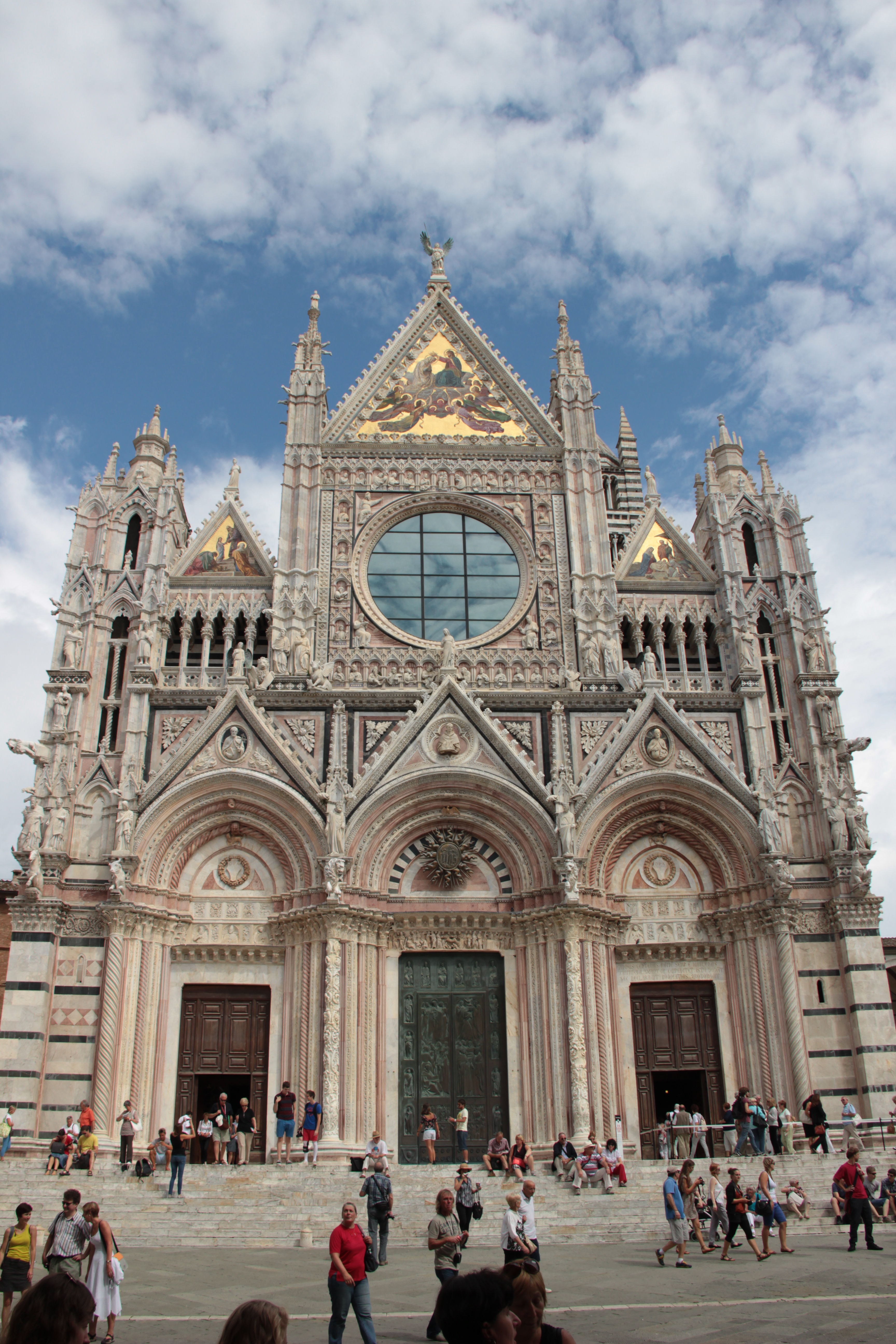 siena 15